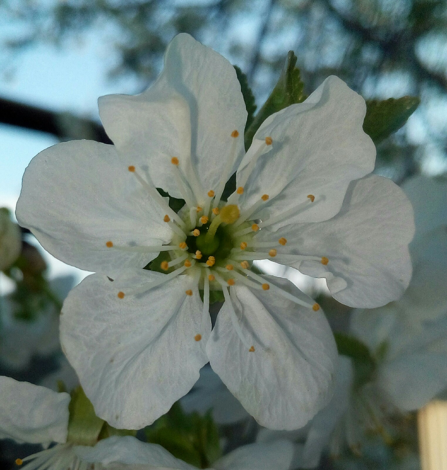 цветок черешни с шестью лепестками